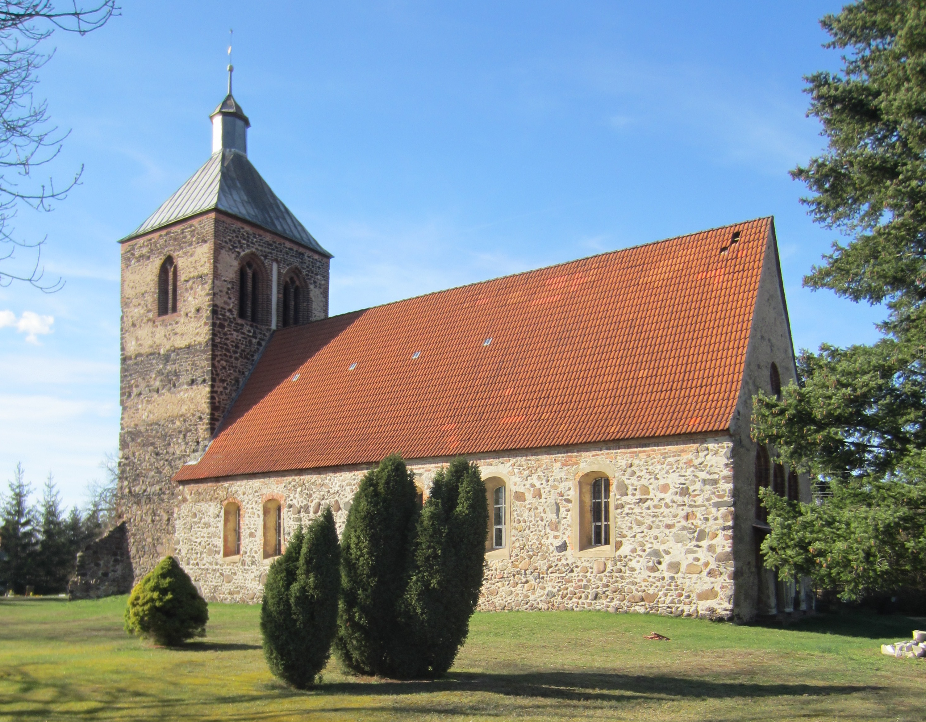 Schlabendorf, Stadt Luckau, denkmalgeschützte Dorfkirche, Ansicht von Südosten